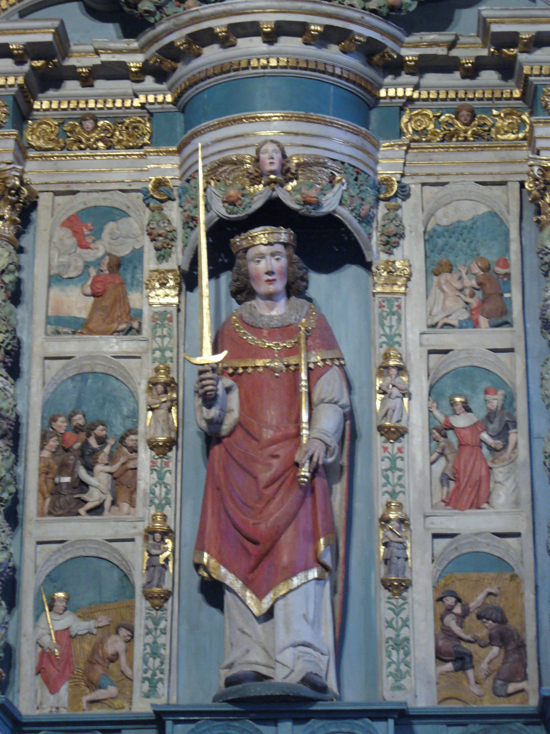 Das Altarbild vom Heiligen Miliau, Prinzen von Cornouaille, der von seinem Bruder 531 ermordet wurde erzählt in den Bildern die Geschichte seines Lebens-Kirche Eglise Saint Miliau(1600)-Guimiliau-Enclos Paroissal-Umfriedeter Pfarrbezirk - Fr: Retable de Saint Miliau